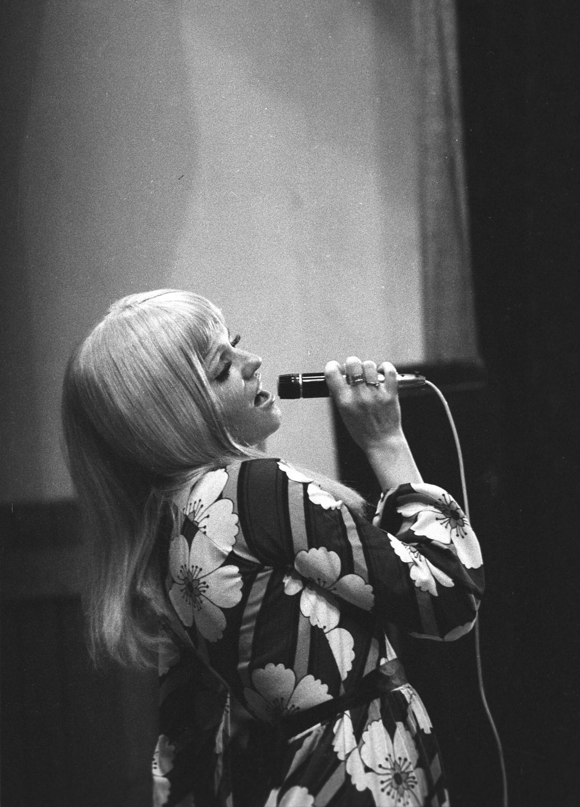 Cserháti Zsuzsa. Location: Hungary Tags: singing Title: Cserháti Zsuzsa.